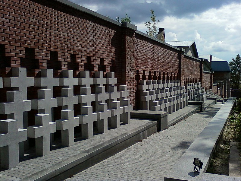 Мемориал жертвам политических репрессий 1941 г. во Львове на Яновском кладбище.